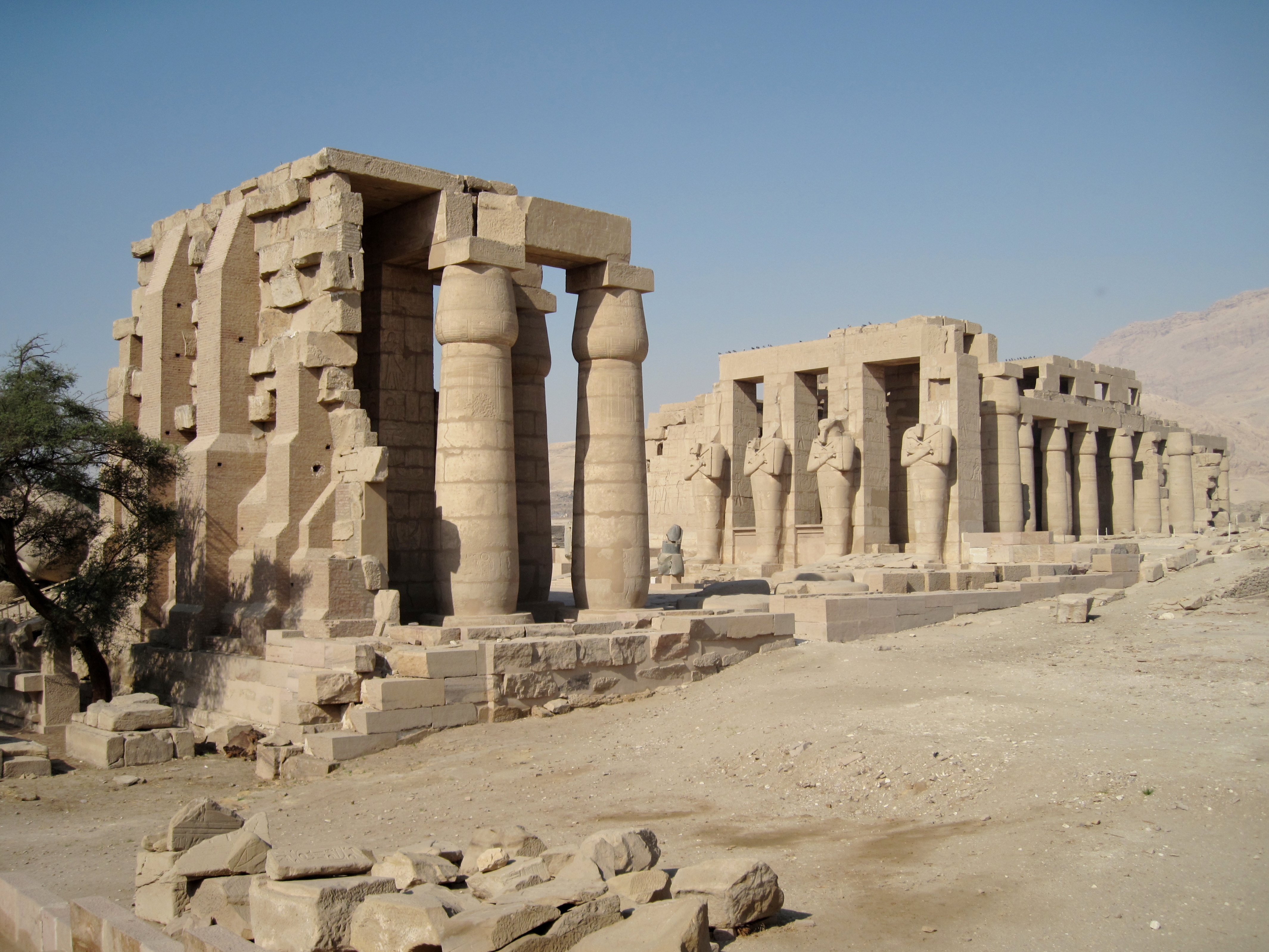 Totentempel des Ramses II. in Theben-West nordwestlich von Luxor, Ägypten